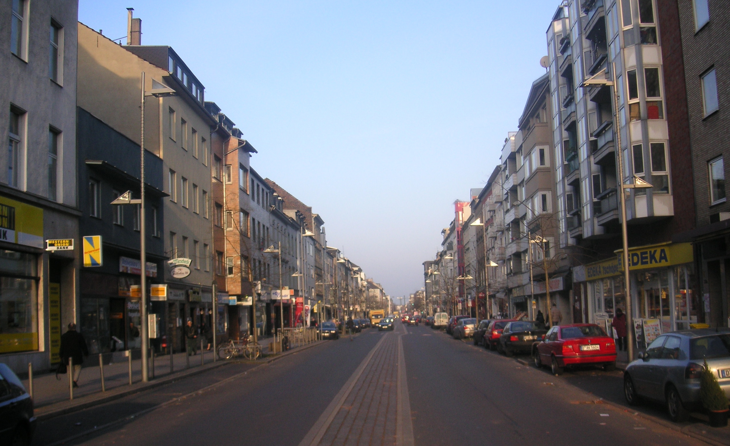 Kölner Straße Düsseldorf-Oberbilk